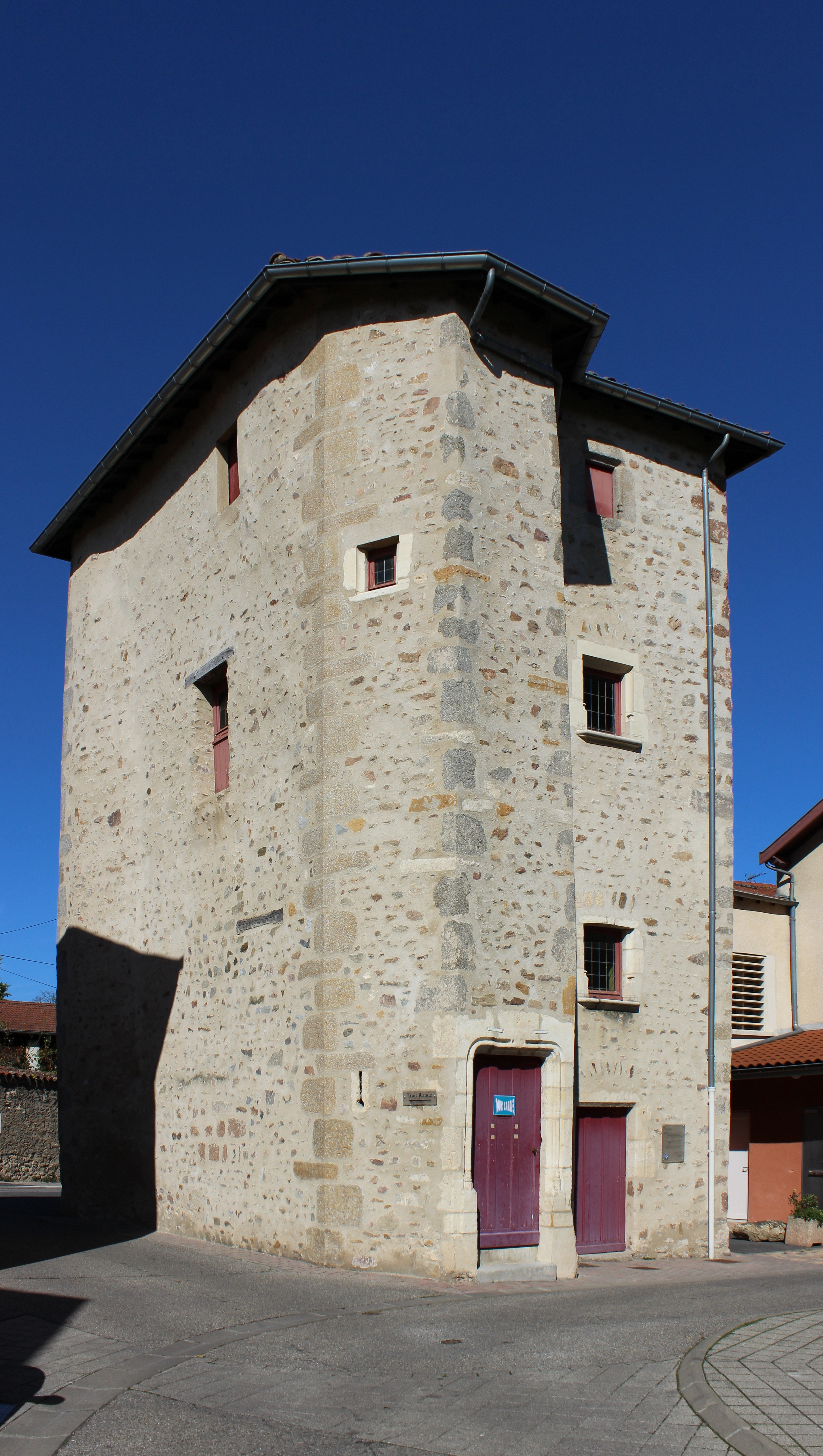 Tour carrée à Grézieu-la-Varenne.